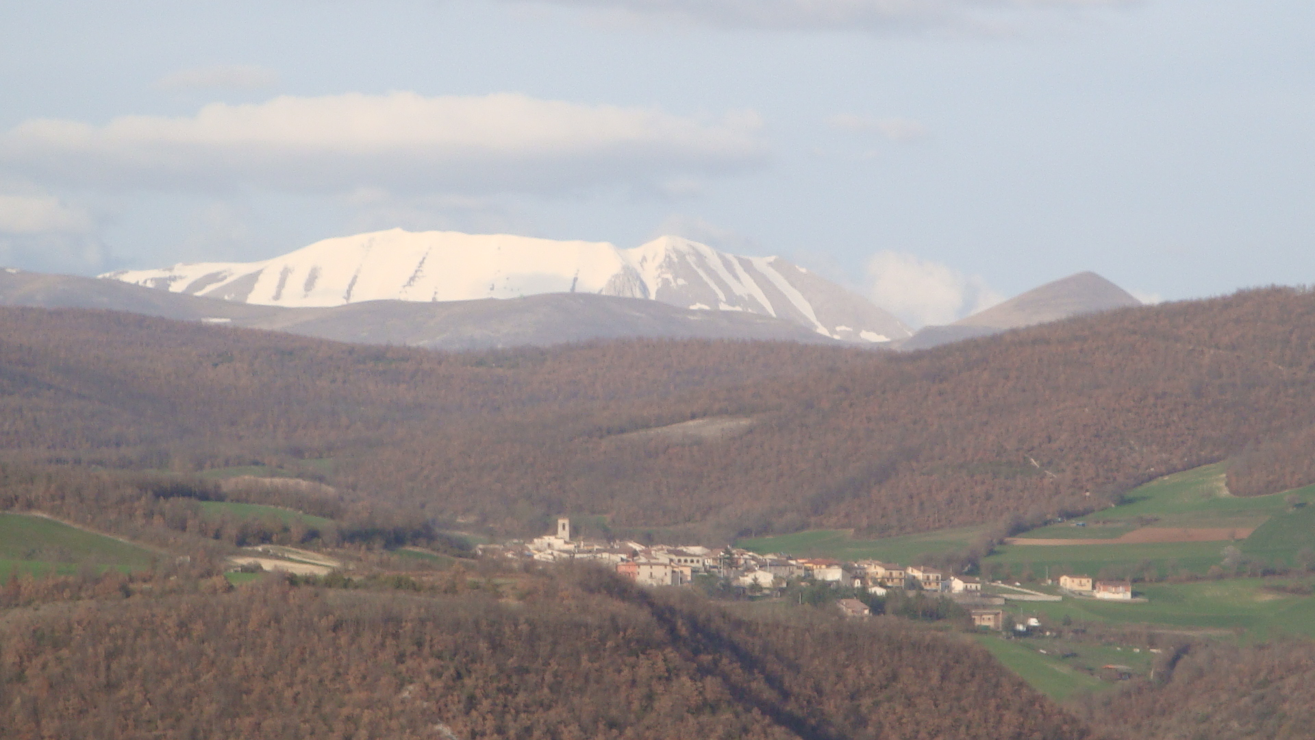 La vetta del Monte Pozzoni (Provincia di Perugia) come appariva il 3 aprile 2010.